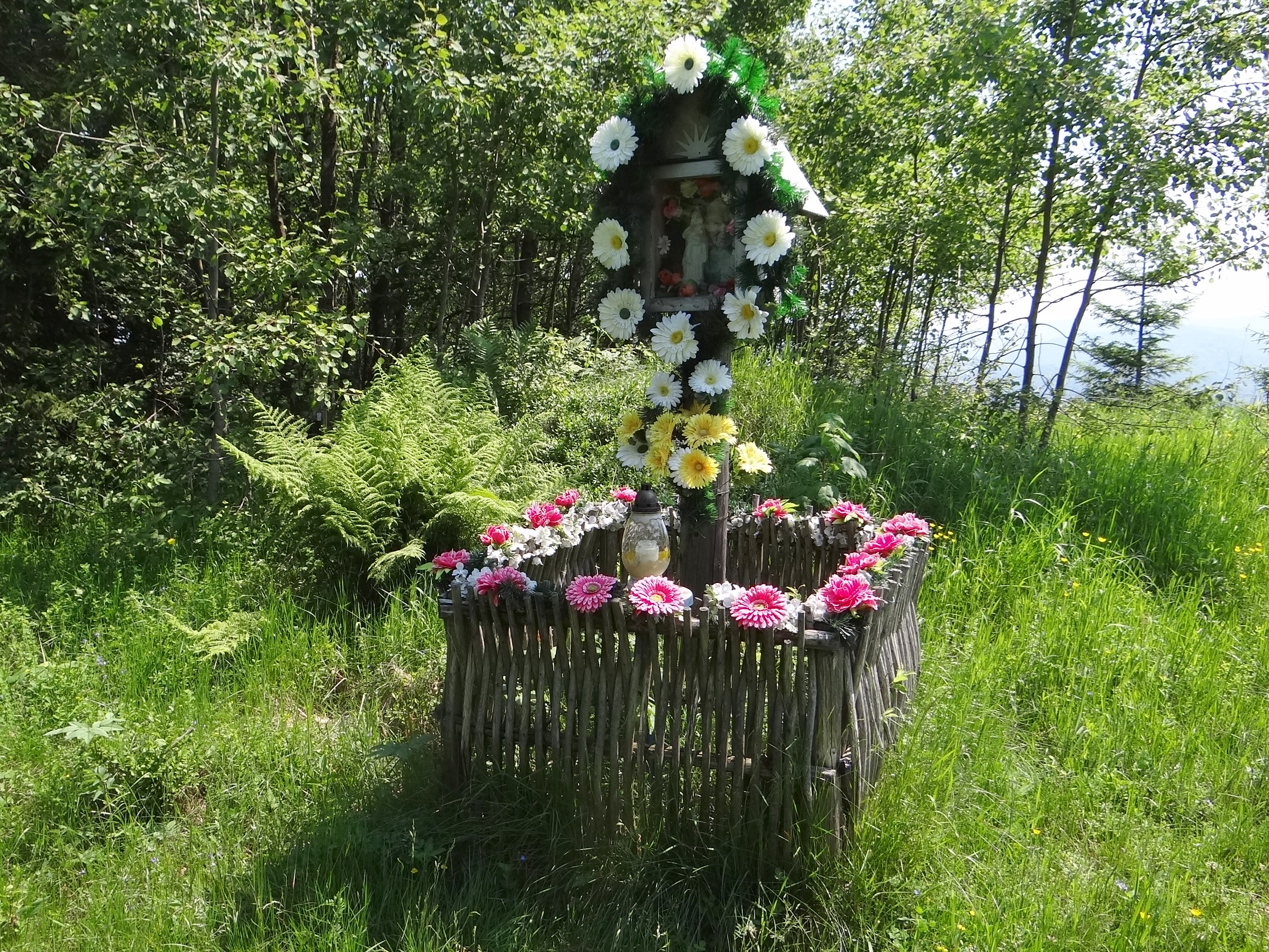 Ukwiecona figurka na wierzchołku Łoska